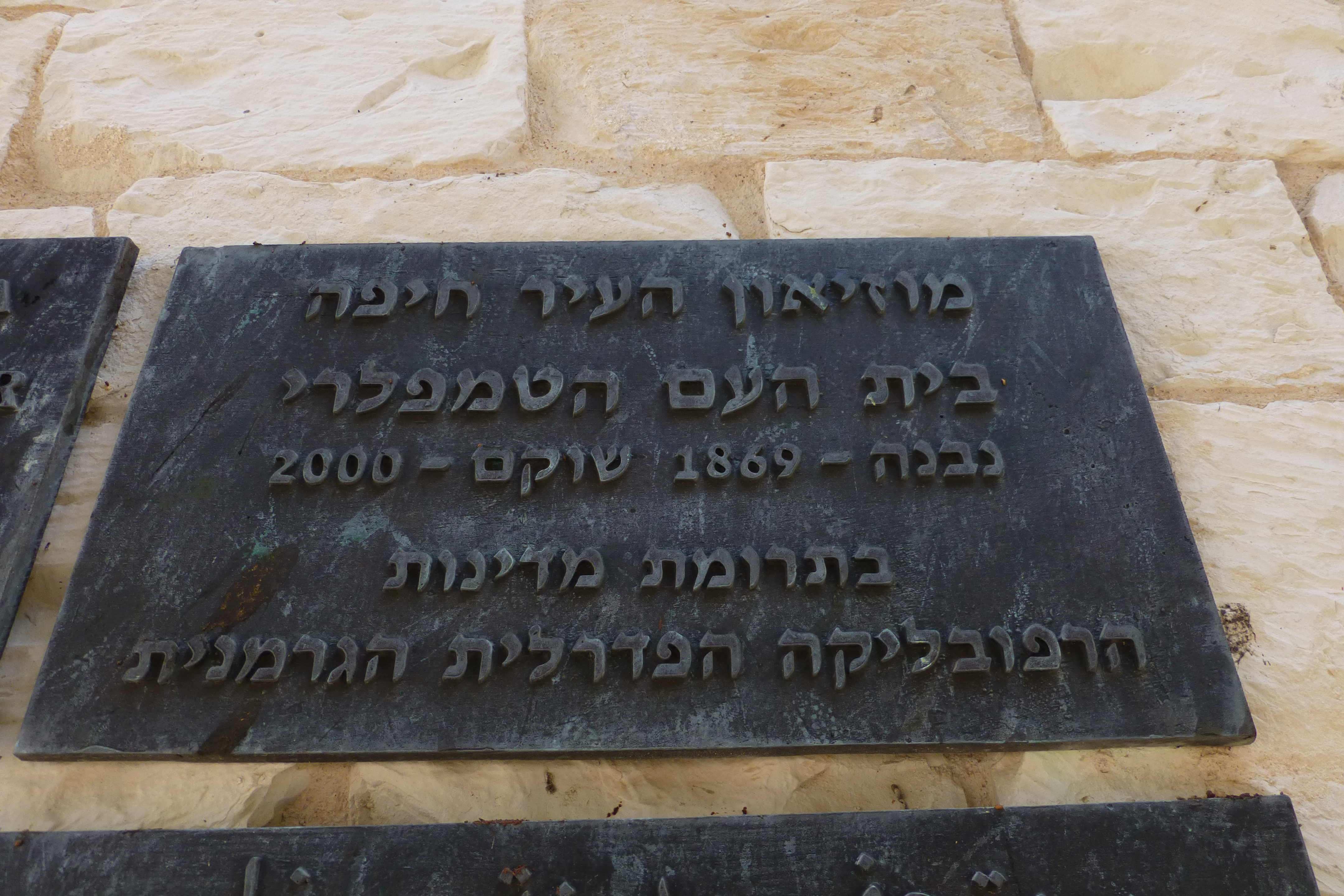 מוזיאון העיר הוא מוזיאון העוסק בתרבות אורבנית ובתיעוד ובהצגת ההיסטוריה של העיר חיפה, . המוזיאון נפתח בנובמבר 2000, והוא ממוקם במבני בית העם הטמפלרי ובית הספר הטמפלרי. המוזיאון הוא חלק ממוזיאוני חיפה. בית העם הטמפלרי הוקם בשנת 1869 והיה הבניין הראשון שהקימו הטמפלרים בארץ.